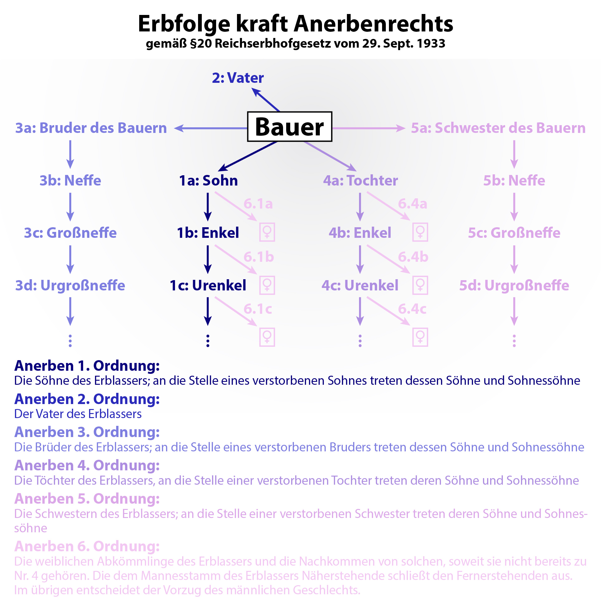 Anerberecht gemäß Reichserbhofgesetz I